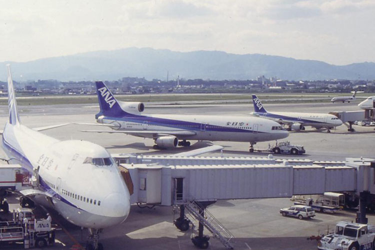 1992年夏ごろの大阪国際空港(OSA/RJOO)。写っているのは手前から、全日空(NH/ANA)のスーパージャンボ(B747SR-81)、トライスター(L-1011-1)、A320(A320-211)です。(1992 Osaka International Airport, JAPAN)